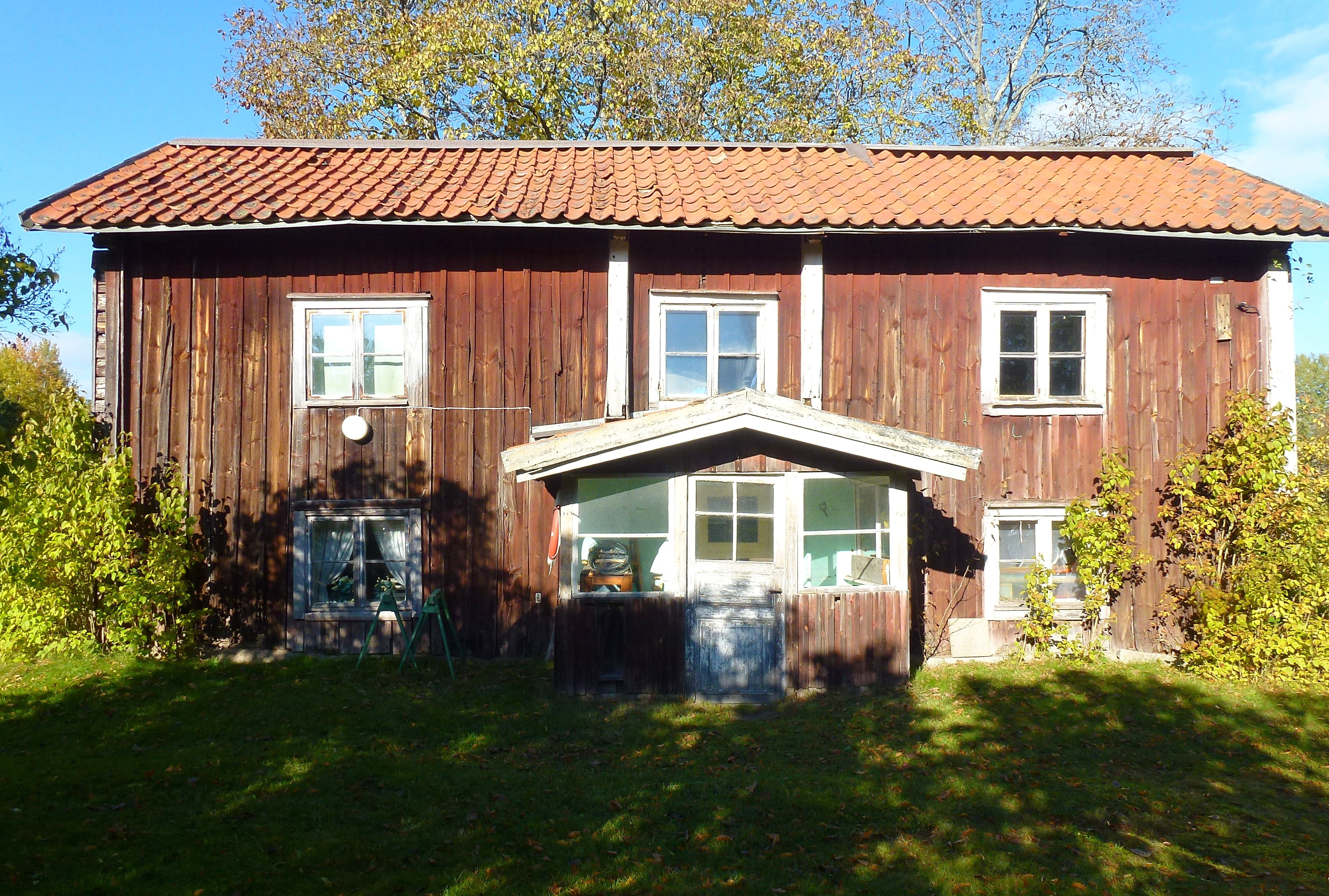 Tenntorps mangård från slutet av 1600-talet